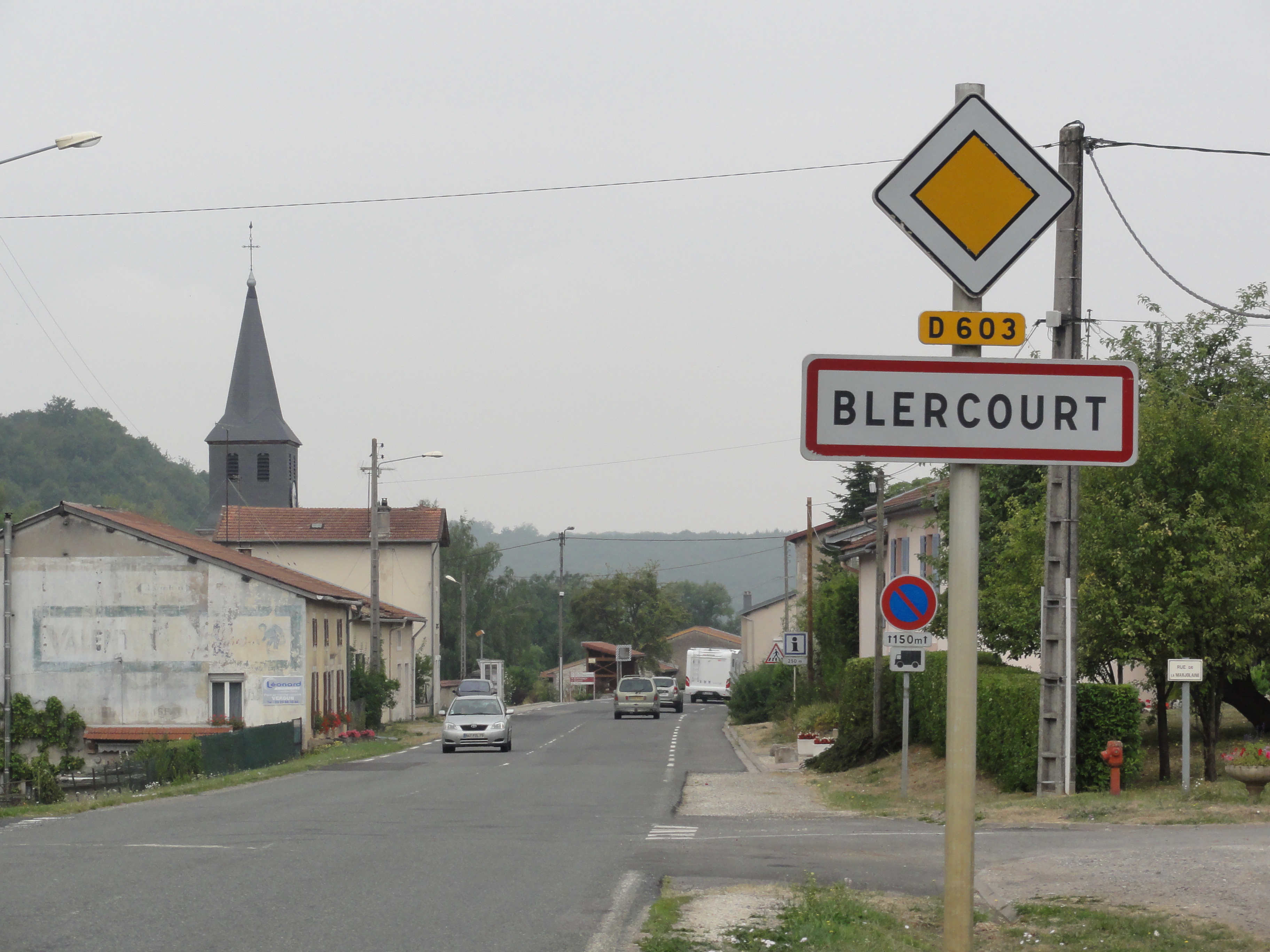 Blercourt (Nixéville-Blercourt, Meuse) city limit sign